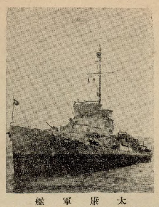 中文（中国大陆）: 中國新海軍插圖